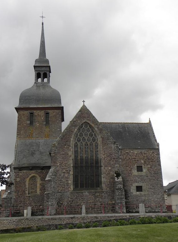 Église Saint-Éloi d'Iffendic (35).